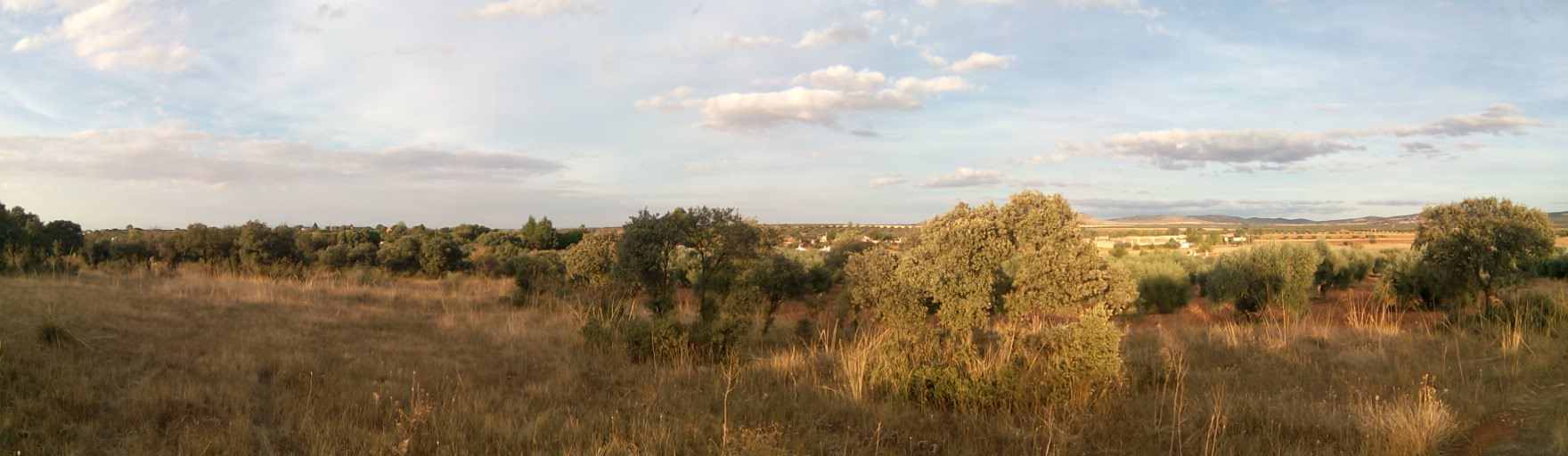 Paisaje del Campo de Calatrava en las inmediaciones de Bolaños de Calatrava